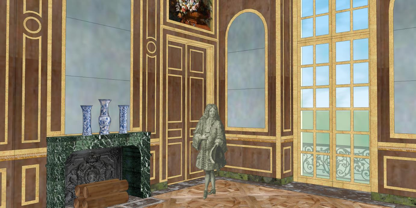 Essai de restitution de la deuxième antichambre du château-neuf de Meudon, vers 1709-1711. La pièce était boisée à la Capucine et dorée.